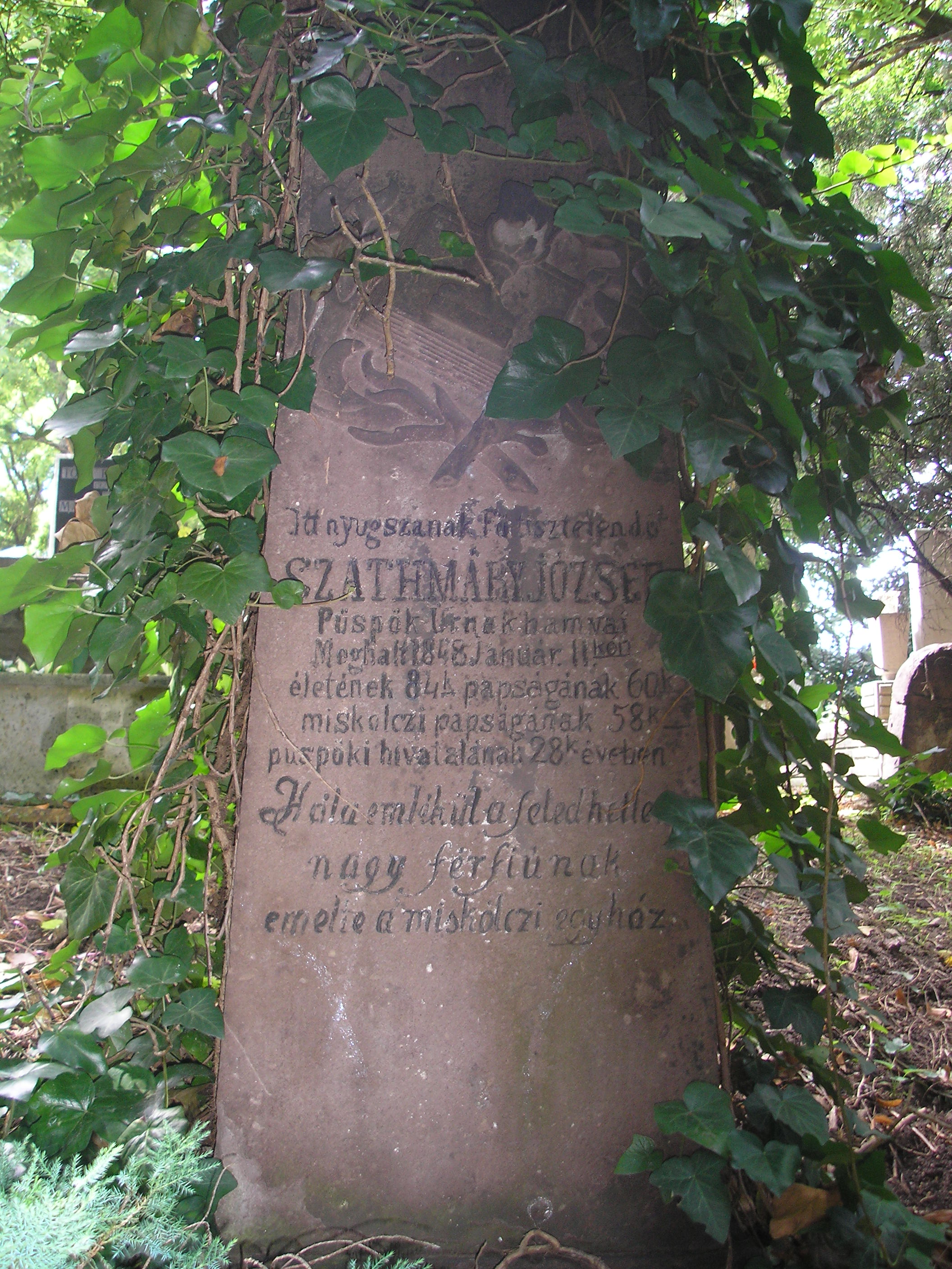 Szathmári Paksi József sírja (Miskolc, Avasi temető)